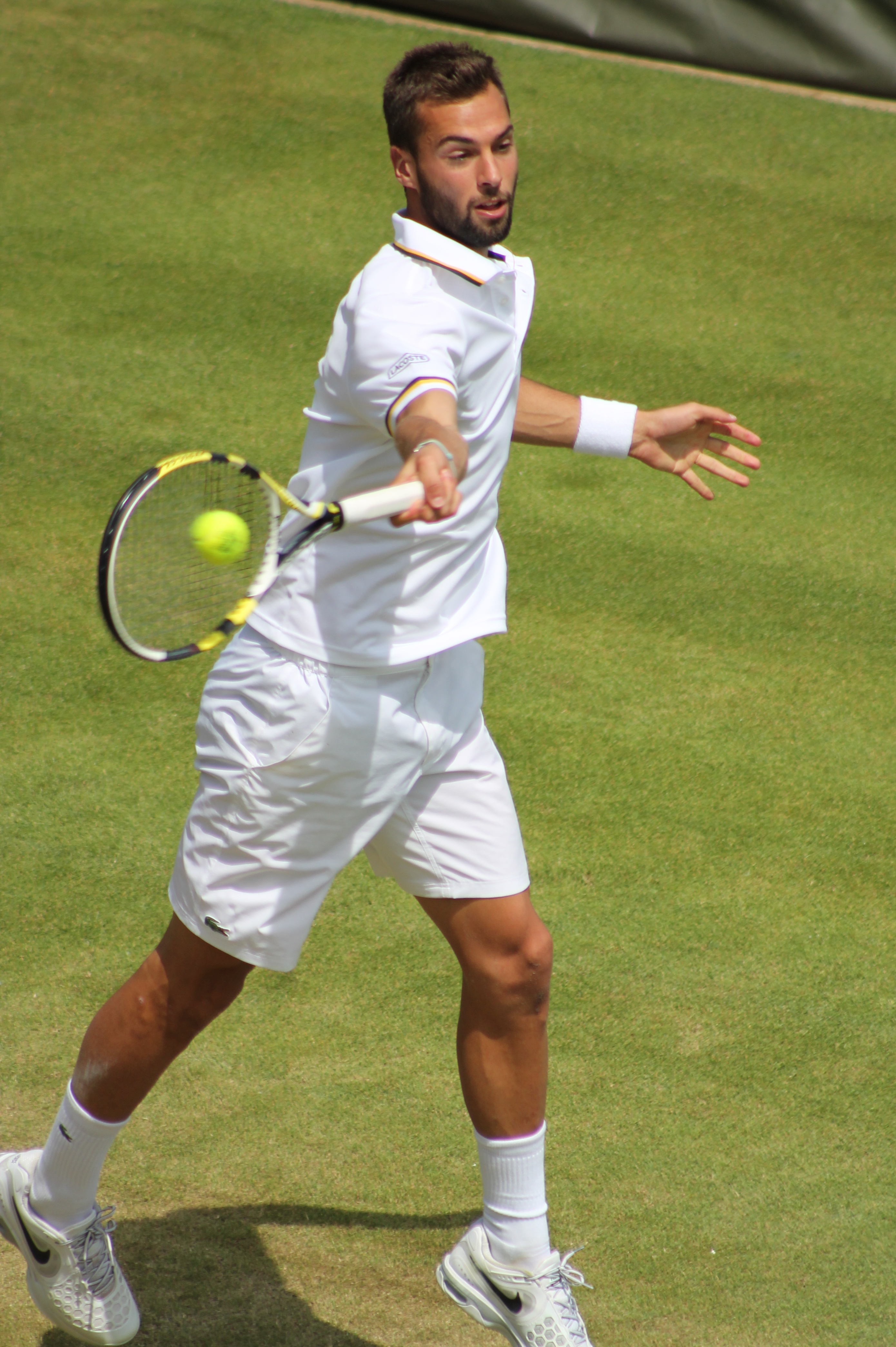 Paire WM13-013